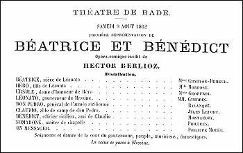 Афиша оперы